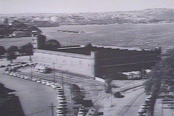 Fort Macquarie tram depot: Bennelong Point